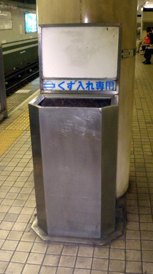 大日寄りホーム端にある古いタイプのゴミ箱